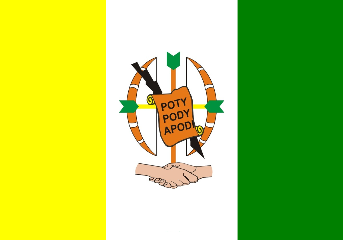 Bandeira de Apodi, estado do Rio Grande do Norte, Brasil.